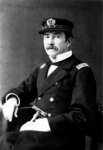 Patricio Javier de los Dolores Lynch Solo de Zaldívar (Santiago de Chile, 1 de diciembre de 1824 - alta mar, cerca de Tenerife, 13 de mayo de 1886), conocido como Patricio Lynch, fue un Vicealmirante de la Armada de Chile, General en Jefe del Ejército de ocupación del Perú y ministro plenipotenciario de Chile en España. Fue el quinto Vicealmirante de Chile, nombrado el 8 de agosto de 1883. Apodado en Chile el "Último Virrey del Perú" por su labor y operaciones realizadas en la ocupación de ese país. Fue hijo de Estanislao Lynch Roo, argentino de origen irlandés, y de Carmen Solo de Zaldívar Rivera. Inició su carrera en la Escuela Militar, de la que pasó a la armada a los 13 años. Participó en la Guerra contra la Confederación Perú-Boliviana, en la Primera Guerra del Opio de parte de Inglaterra y en la Guerra del Pacífico.[1] Murió a bordo del vapor inglés Cotopaxi, en Tenerife.[2]